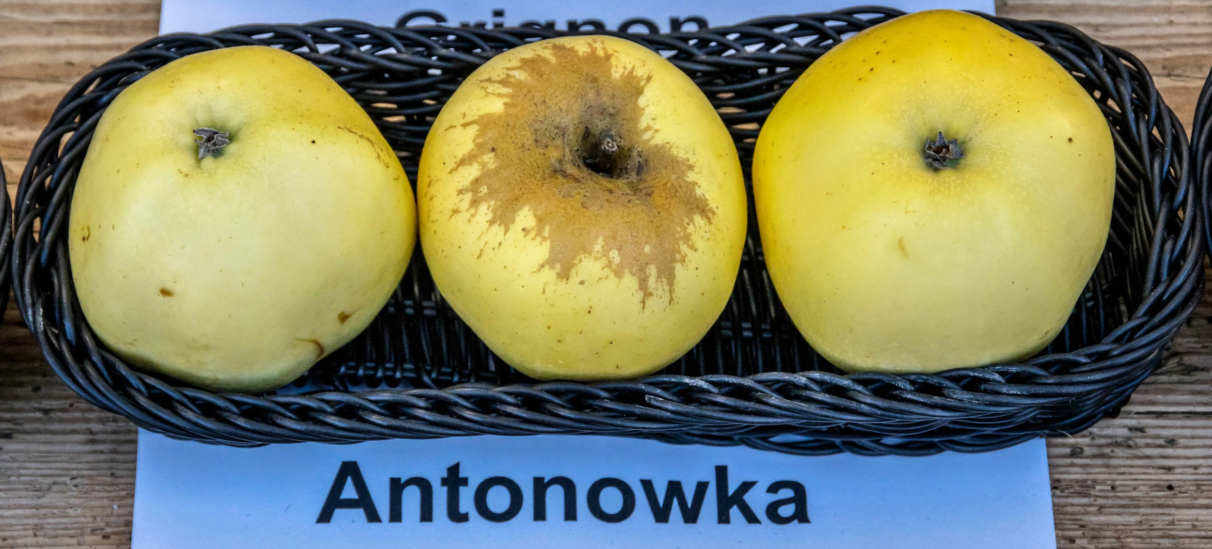 Alte Apfelsorten, von denen es im Badischen noch tragende Bäume gibt. Alle Aufnahmen au dem Oktober 2015